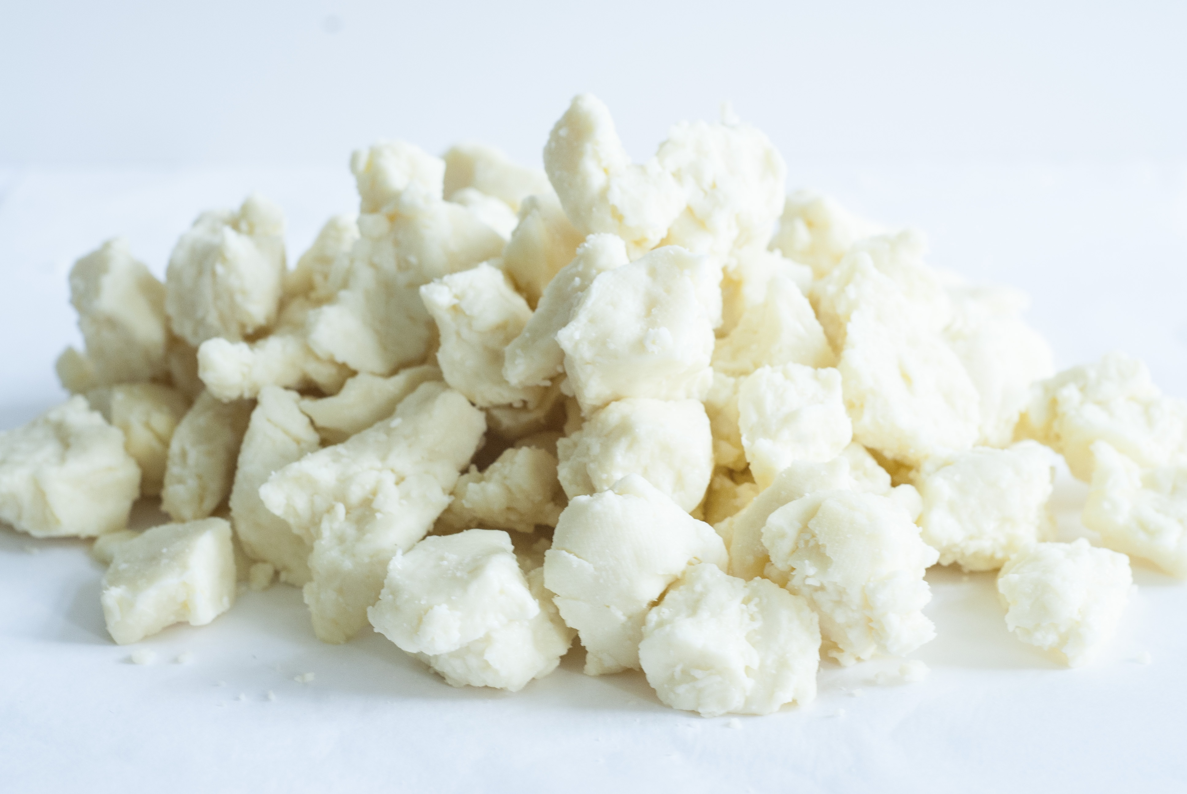 Cheese Curds aus Brandenburg